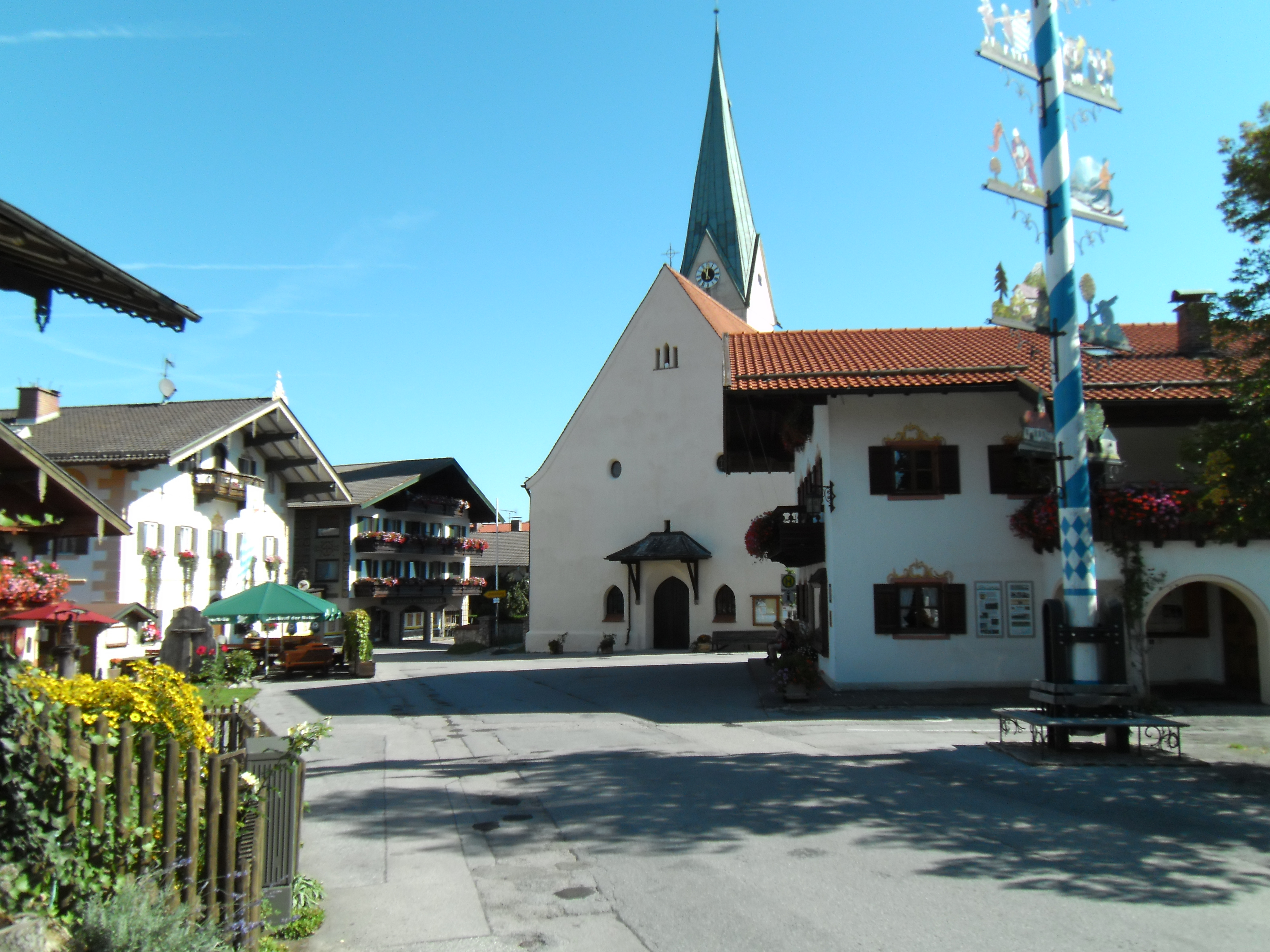 Törwang (Gemeinde Samerberg, Landkreis Rosenheim, Obb.), Dorfzentrum mit dem Gasthaus und Hotel "Zur Post" (links im Bild)